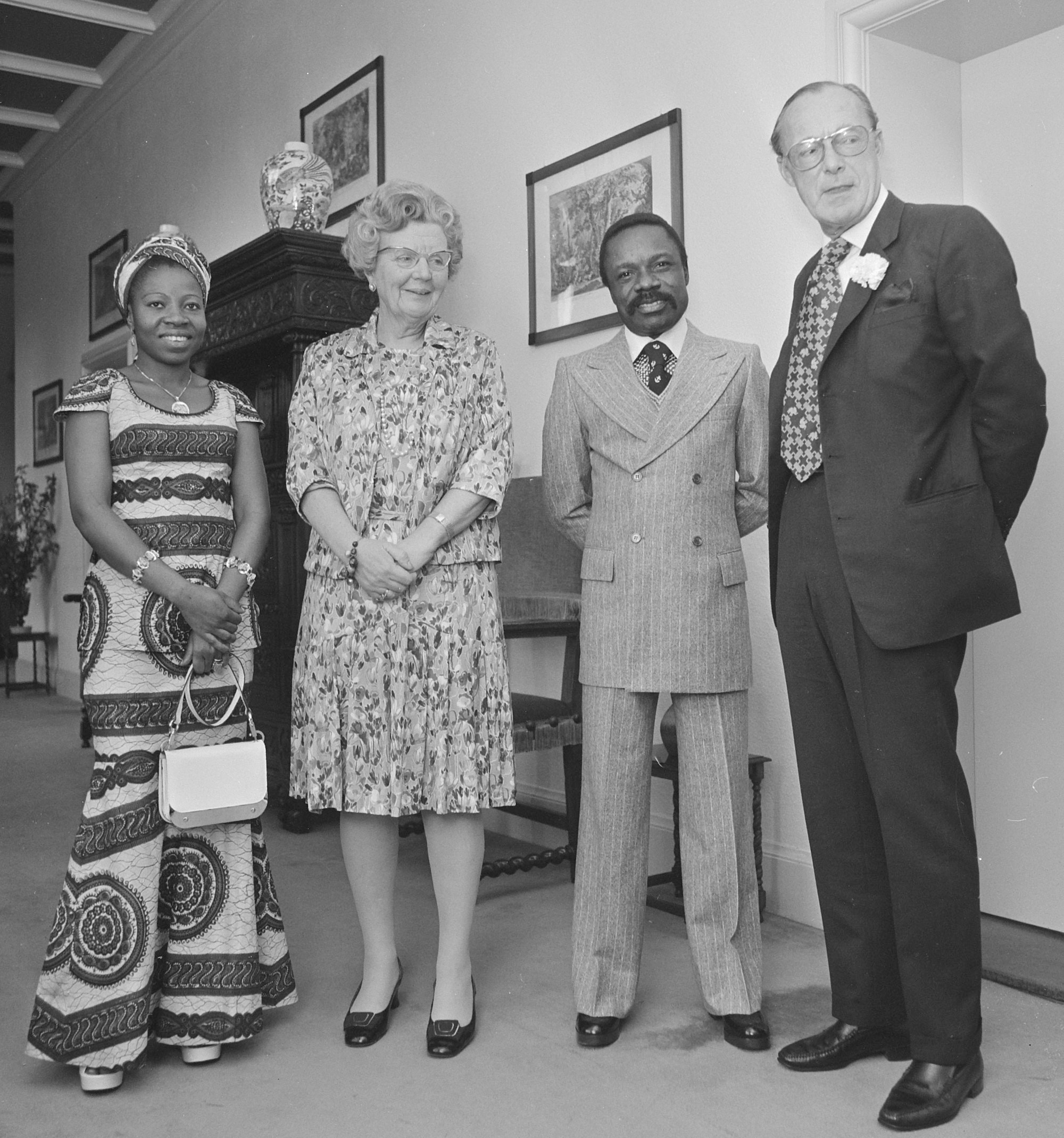 Koningin Juliana en prins Bernhard ontvangen president Omar Bongo van Gabon en zijn echtgenote op paleis Soestdijk. V.l.n.r. mevrouw Bongo, koningin Juliana, president Bongo en prins Bernhard